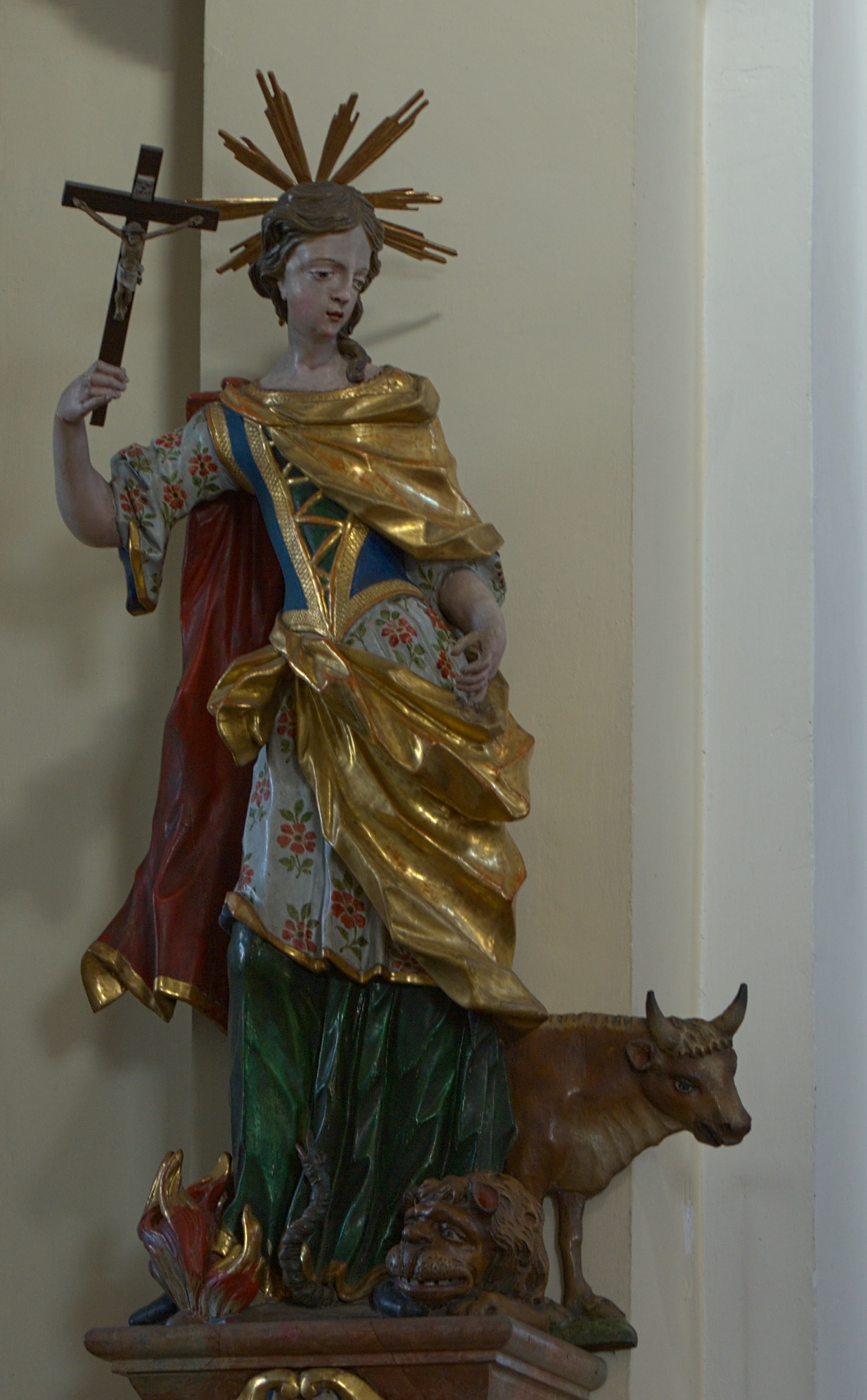 Kath. Pfarrkirche hl. Nikolaus, Hl. Thekla